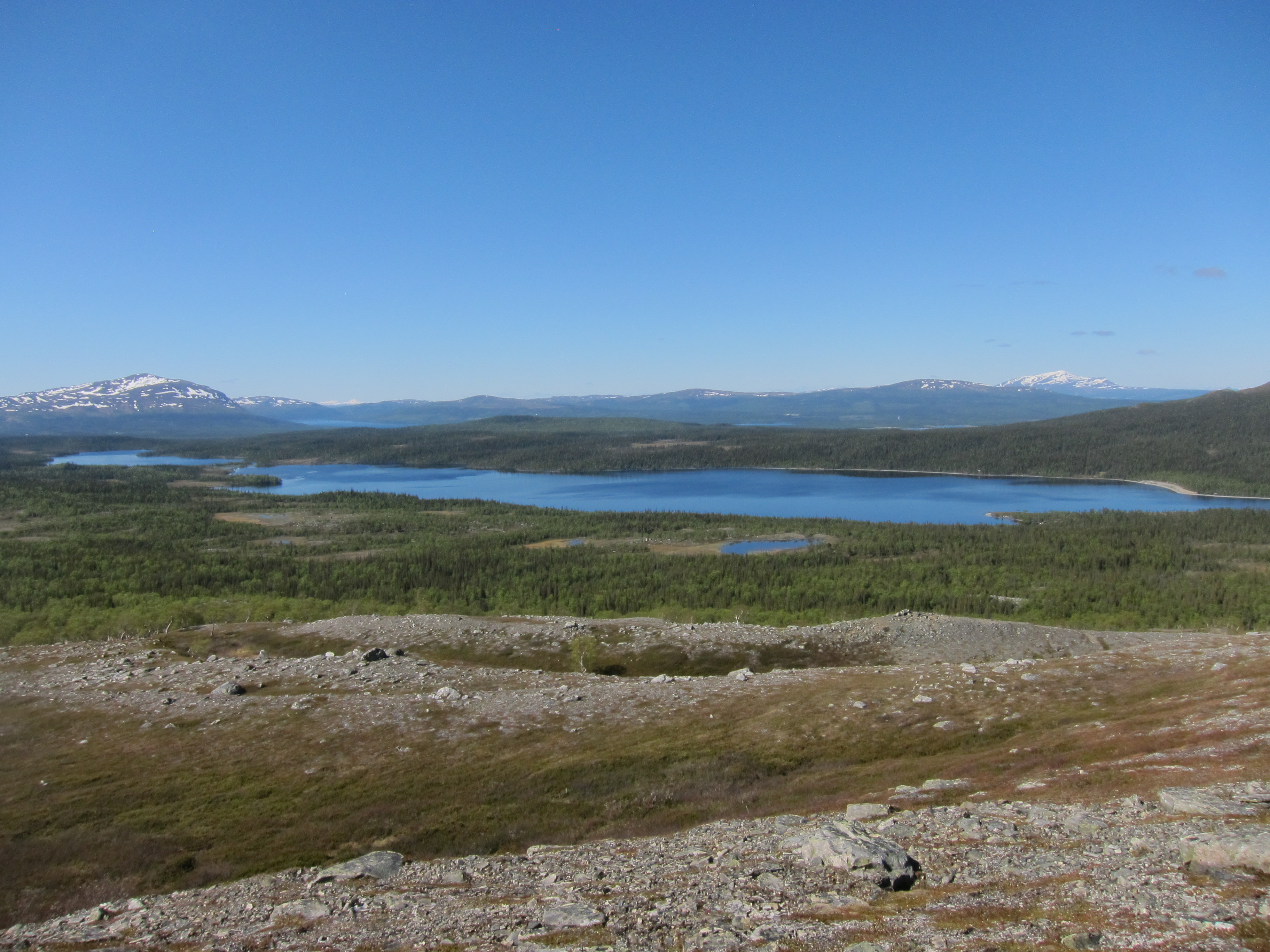 Östra vattensjön från söder. I vålådalen.